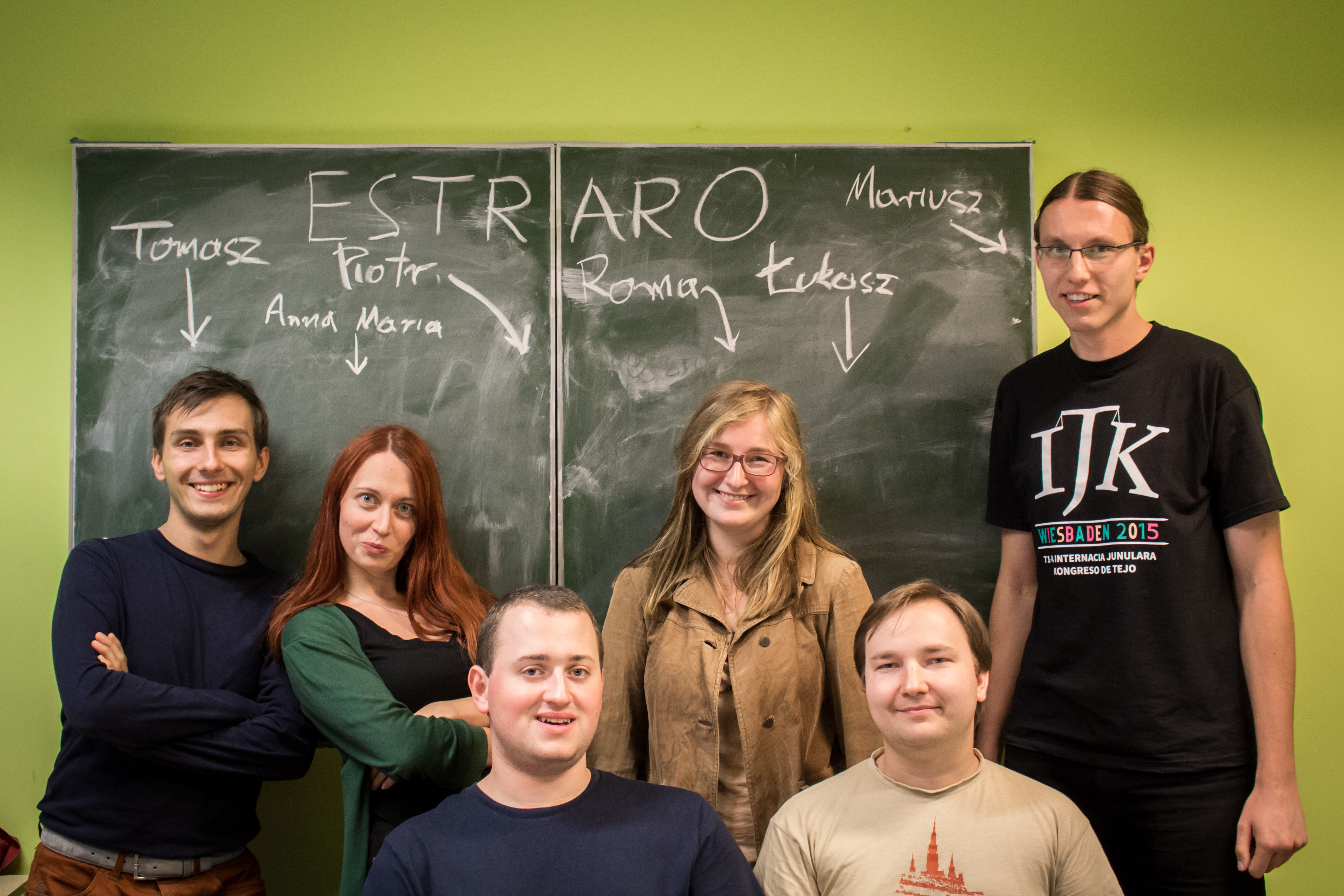 La Estraro de Pola Esperanto-Junularo en 2015. Ĝin formas: Prezidanto: Romualda Jeziorowska Vicprezidanto: Piotr Hołda Sekretario: Łukasz Żebrowski Kasisto: Mariusz Hebdzyński Estraranino pri eksteraj rilatoj: Anna Maria Koniecpolska-Lachowska Estrarano: Tomasz Szymula